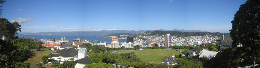 Photo pano de Wellington (photo personnel 2006) Utilisateur:FRED